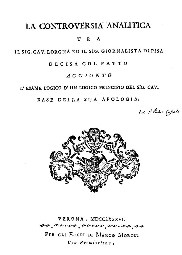 La controversia analitica tra il sig. cav. Lorgna ed il sig. giornalista di Pisa decisa col fatto aggiunto l'esame logico d'un logico principio del sig. cav. base della sua apologia. - Verona : per gli eredi di Marco Moroni, 1786. - 11 p. ; 4º .